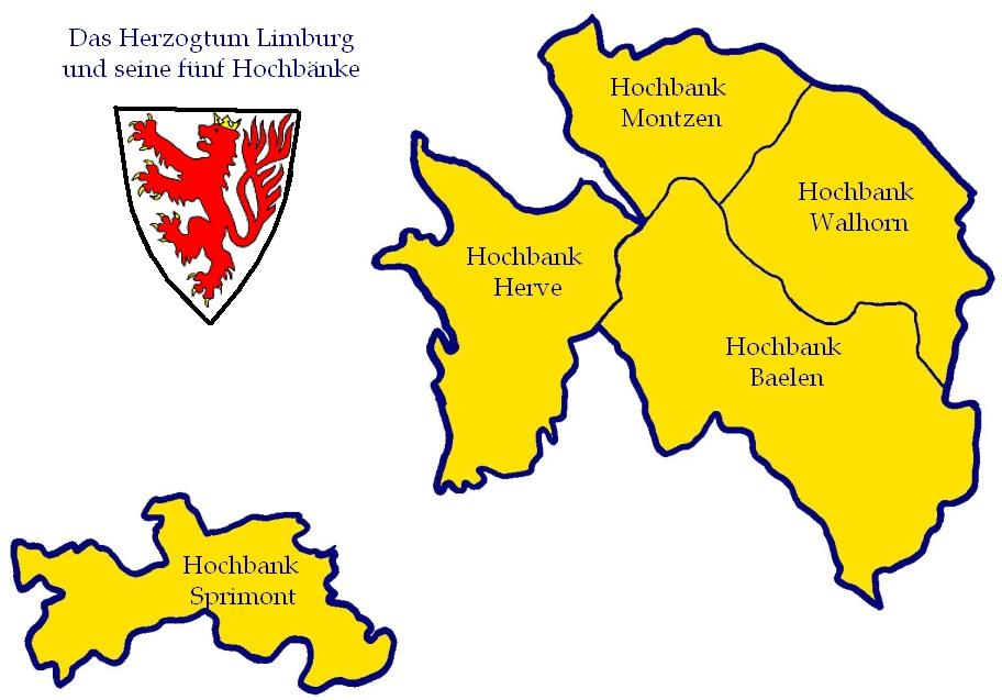 Karte des Herzogtums Limburg, aufgeteilt in die fünf Hochbänke